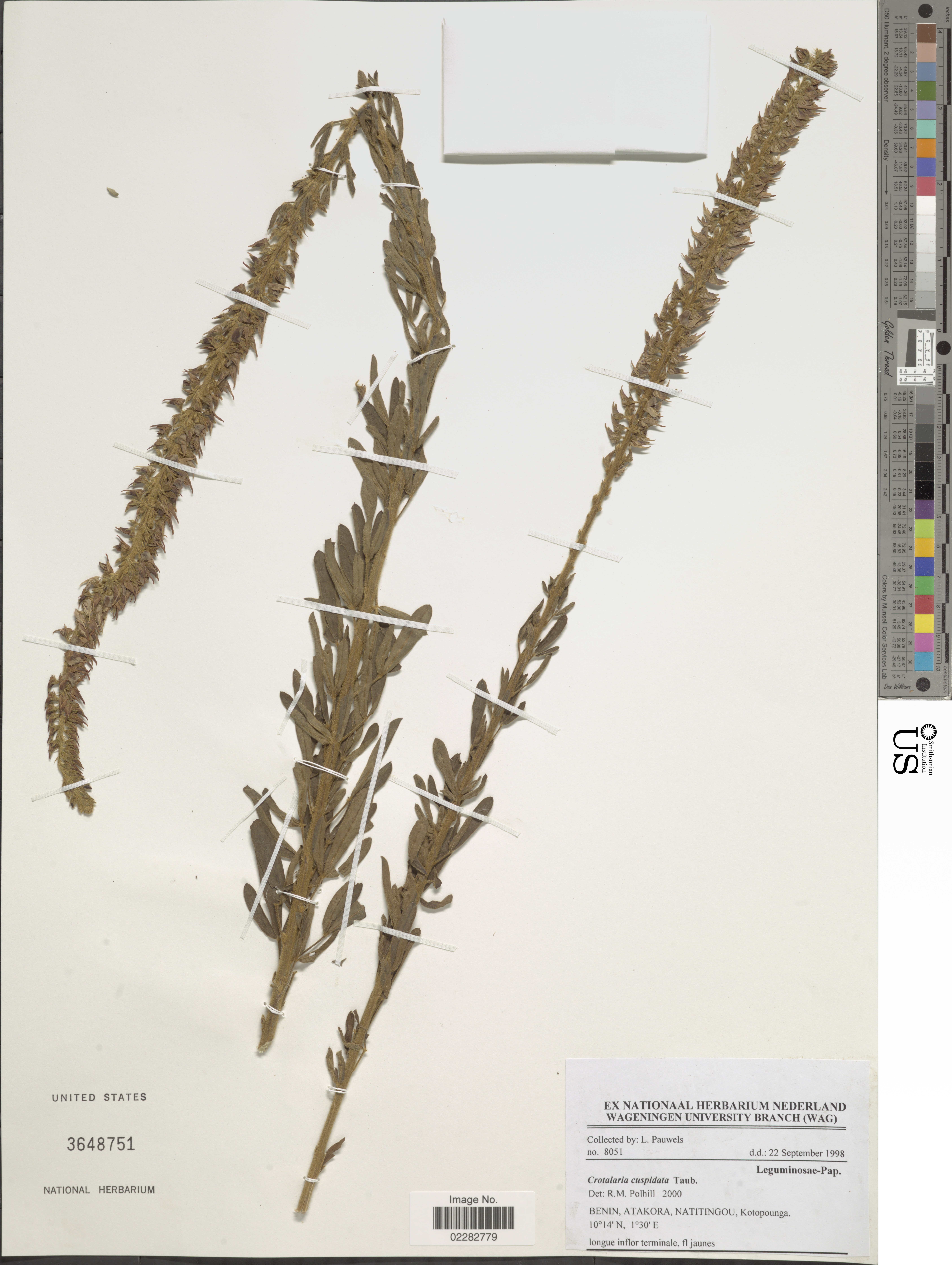 Crotalaria cuspidata Taub. Object Details Biogeographical Region 22 - West Tropical Africa Collector L. Pauwels Record Last Modified 29 Dec 2017 Specimen Count 1 Collection Date 22 Sep 1998 Barcode 02282779 USNM Number 3648751 Place Natitingou, Kotopounga., Atakora, Benin, Africa Published Name Crotalaria cuspidata Taub. Taxonomy Plantae Dicotyledonae Rosales Fabaceae Faboideae NMNH - Botany Dept. Record ID nmnhbotany_13303476 Usage of Metadata (Object Detail Text) CC0 GUID (Link to Original Record)